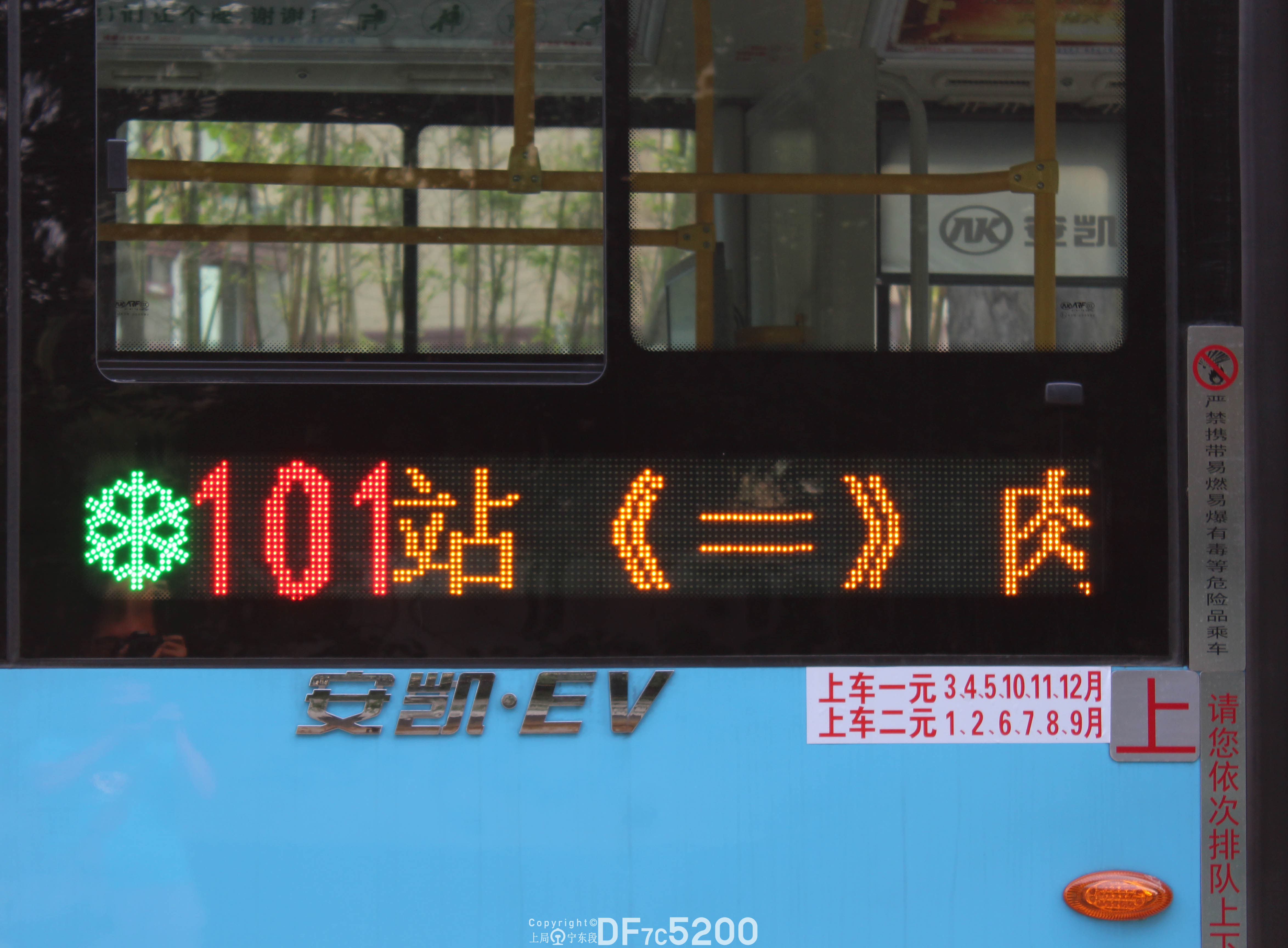 中文（中国大陆）: Bengbu Bus No.101 LED Plate